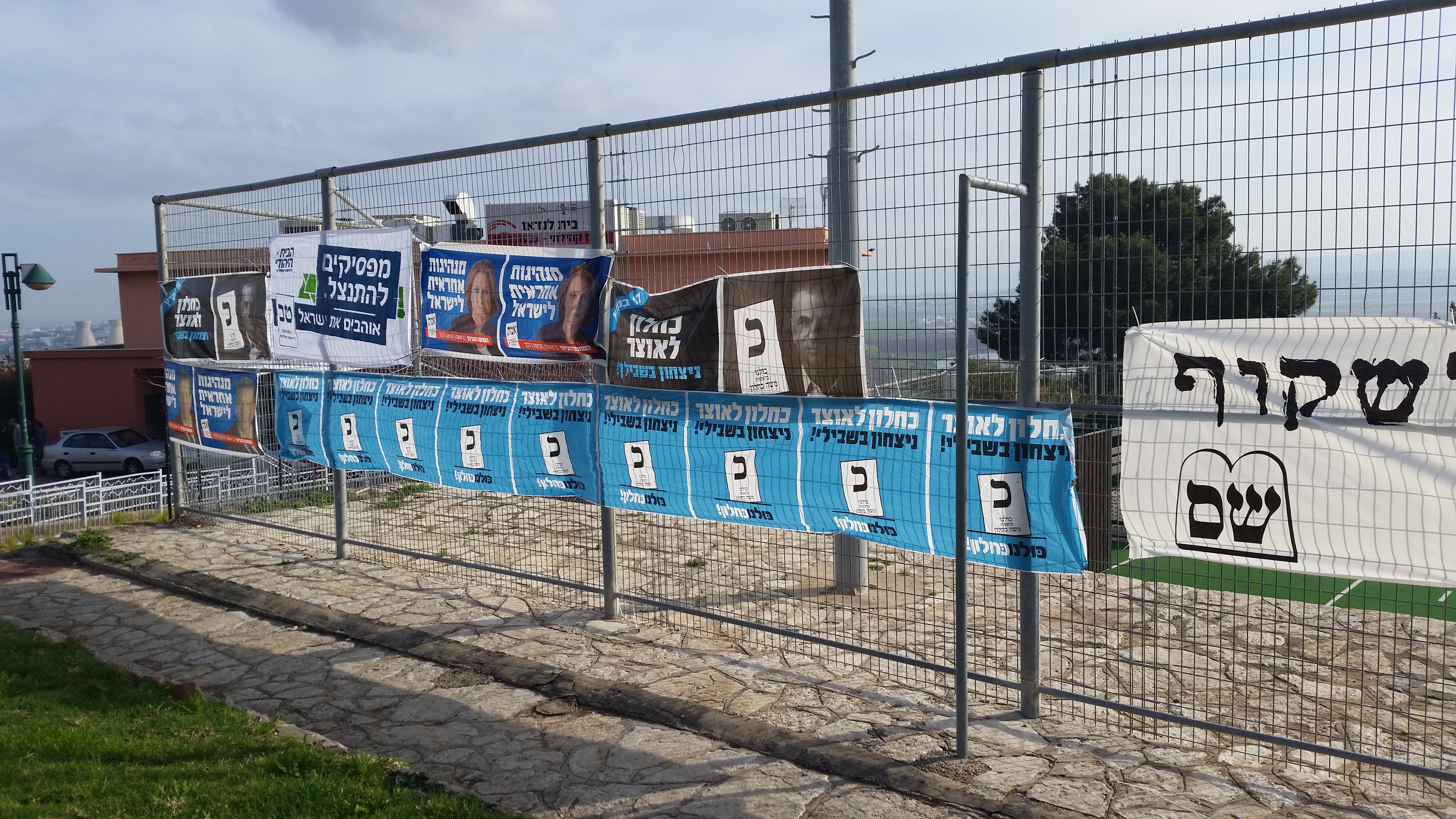 שלטי בחירות 2015 בגבעת נשר